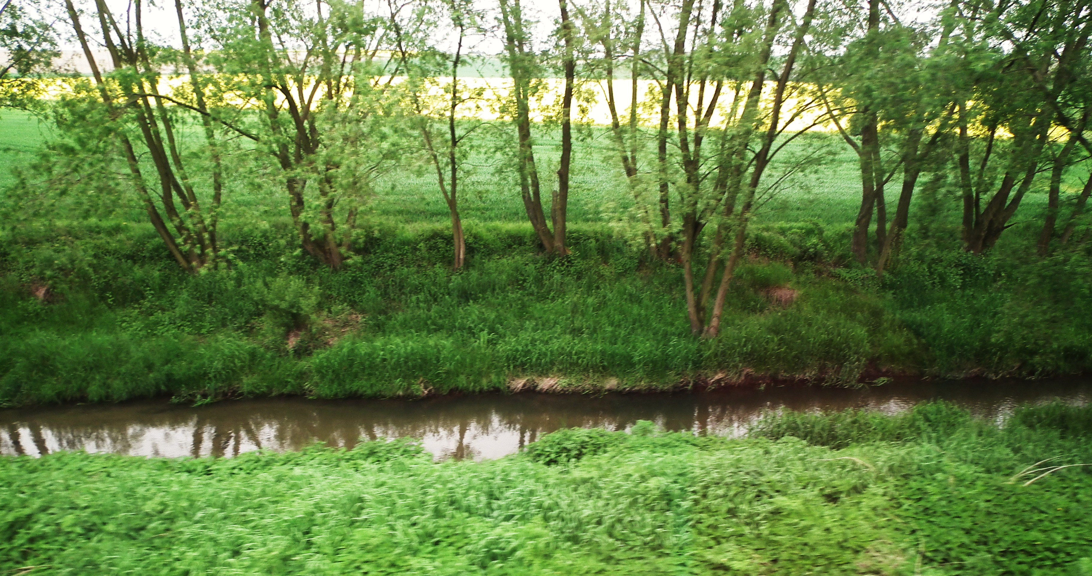 Psina w Cyprzanowie.